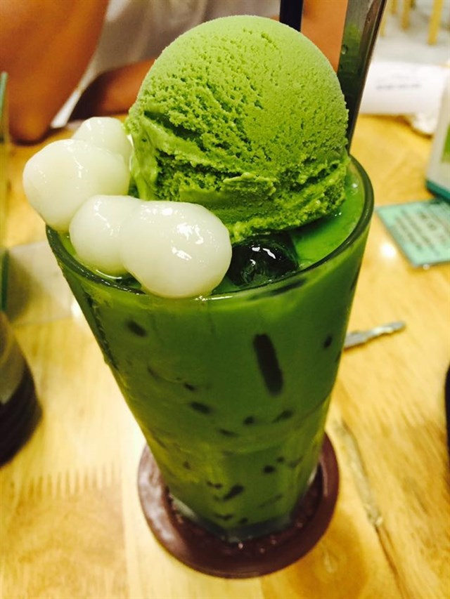 Các loại thức uống matcha, bánh ngọt, món ăn Nhật Bản